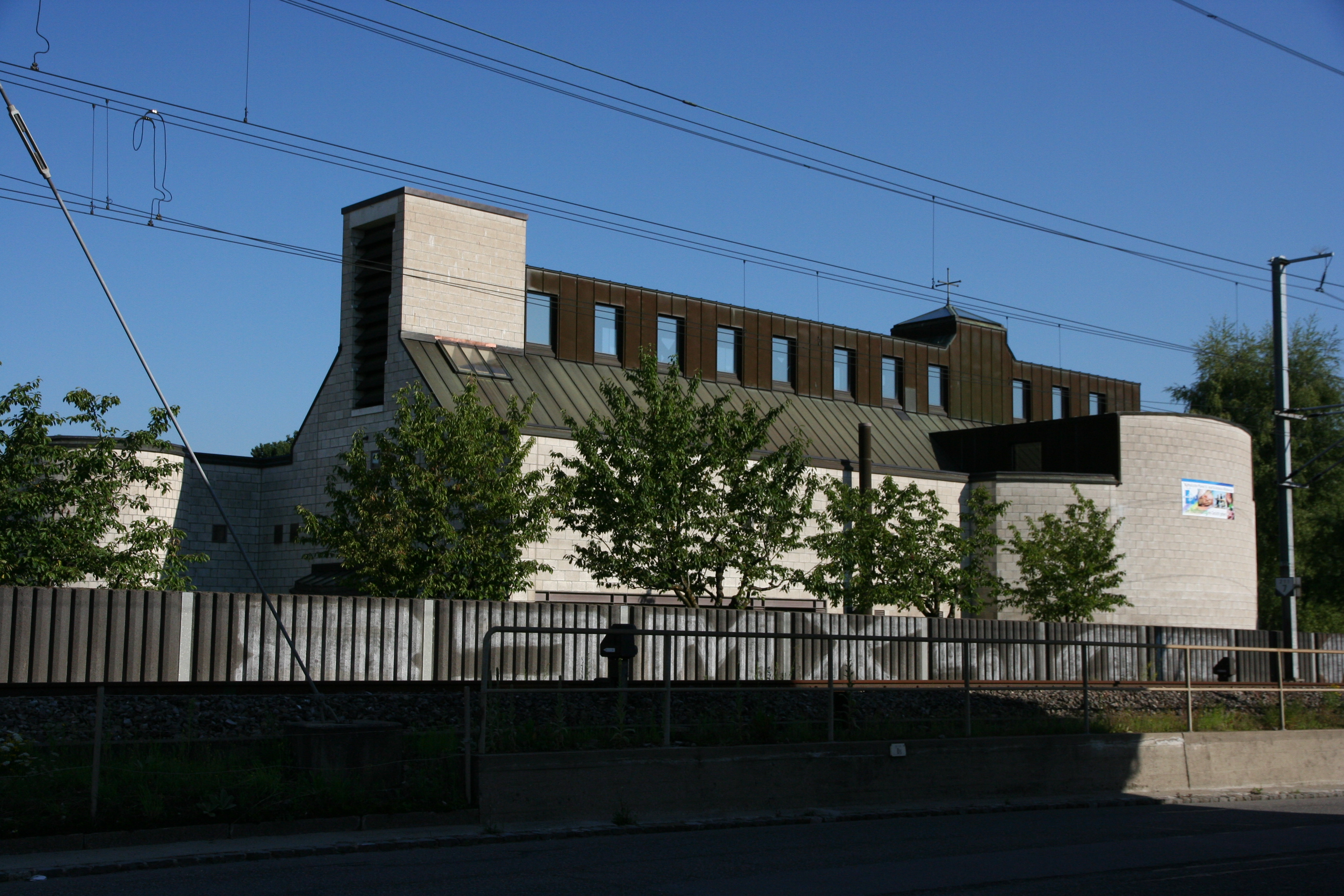 Römisch-katholische Pfarrkirche St. Josef Affoltern am Albis, Aussenansicht von Süden